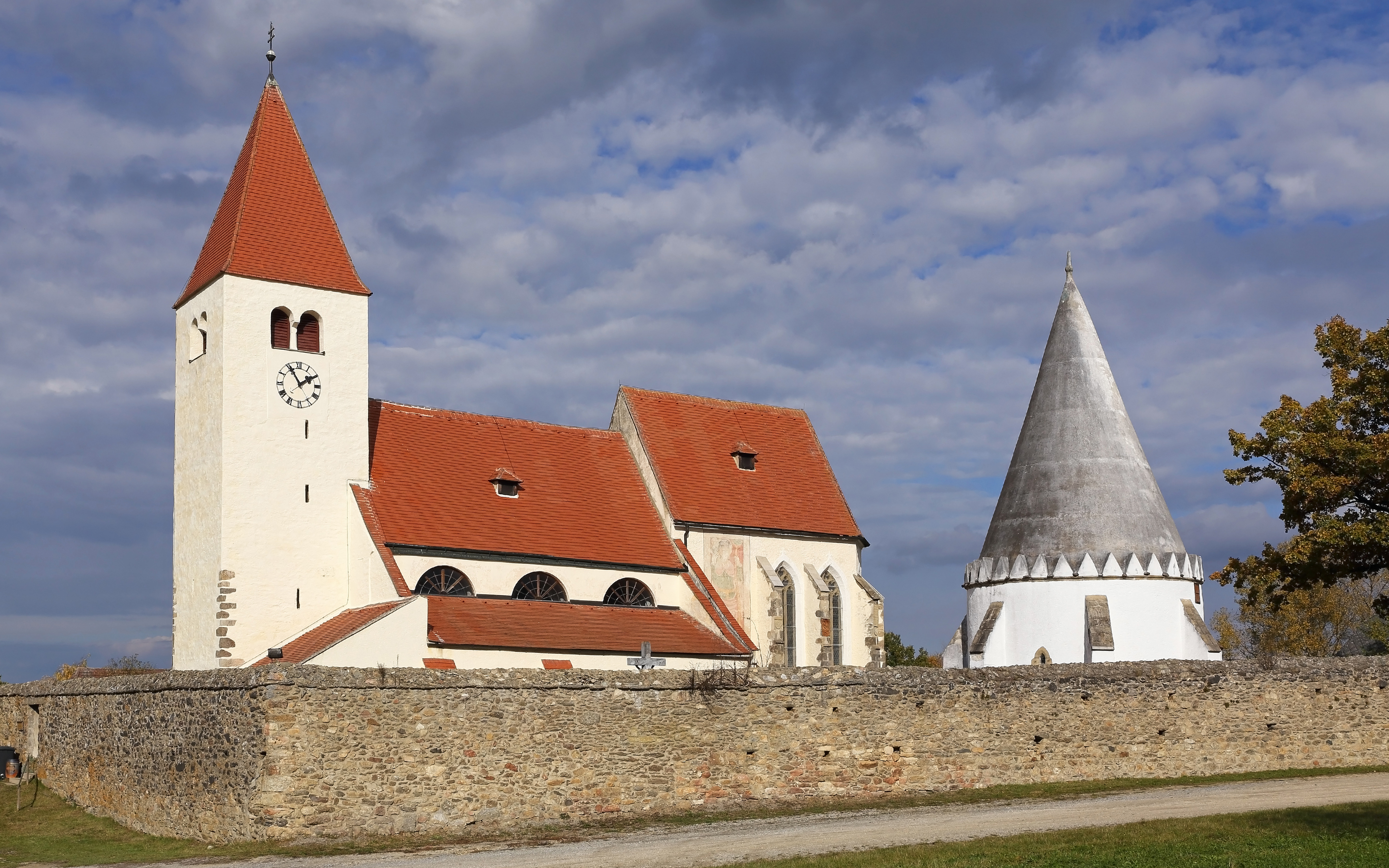 Pfarrkirche hl. Laurentius und Karner in Friedersbach (Bezirk Zwettl) von Südwest